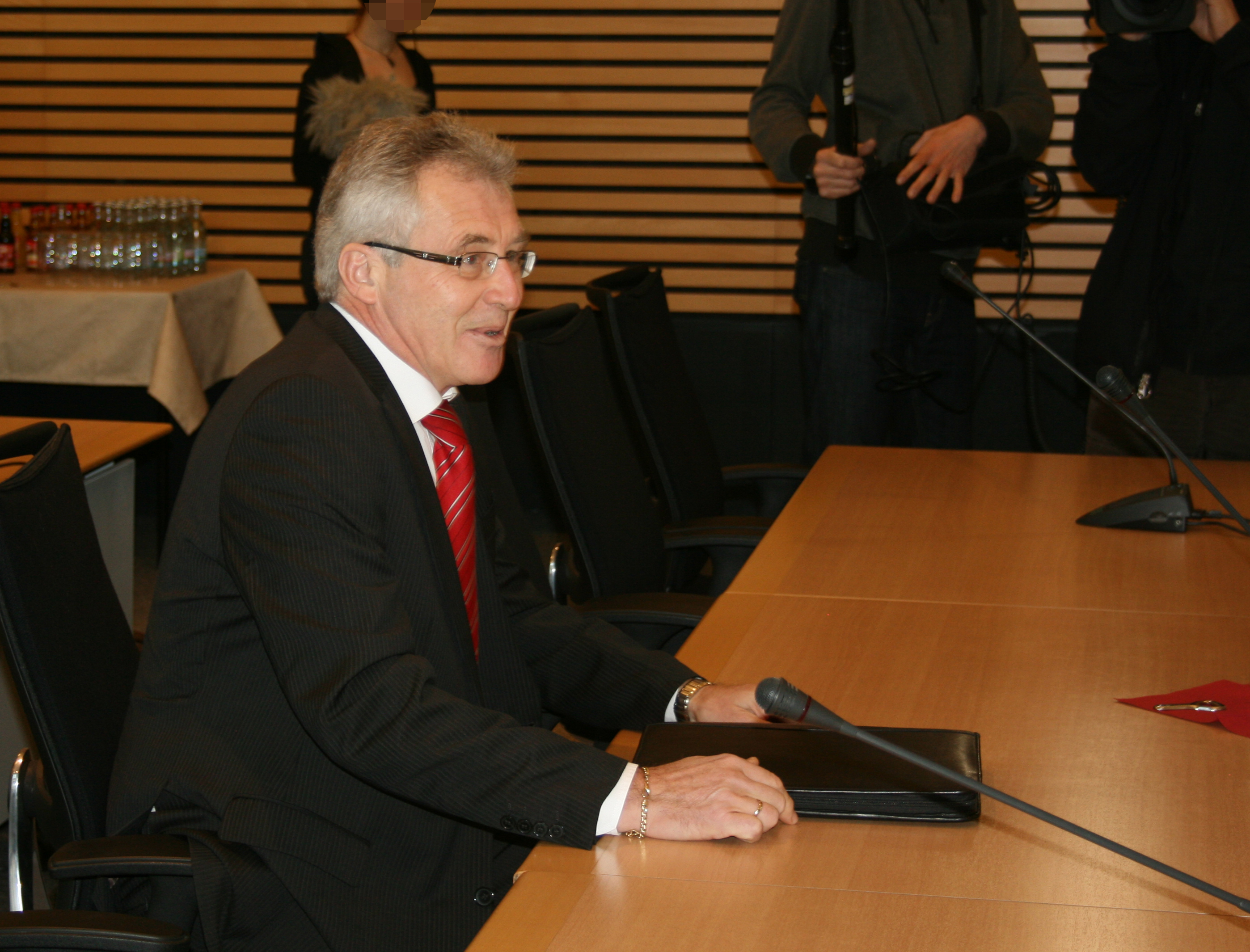 Werner Jakstat, Leiter des Landeskriminalamtes Thüringen, vor einer Sitzung des Untersuchungsausschusses des Thüringer Landtages zum „Nationalsozialistischen Untergrund|Nationalsozialistischer Untergrund|Nationalsozialistischen Untergrund“.